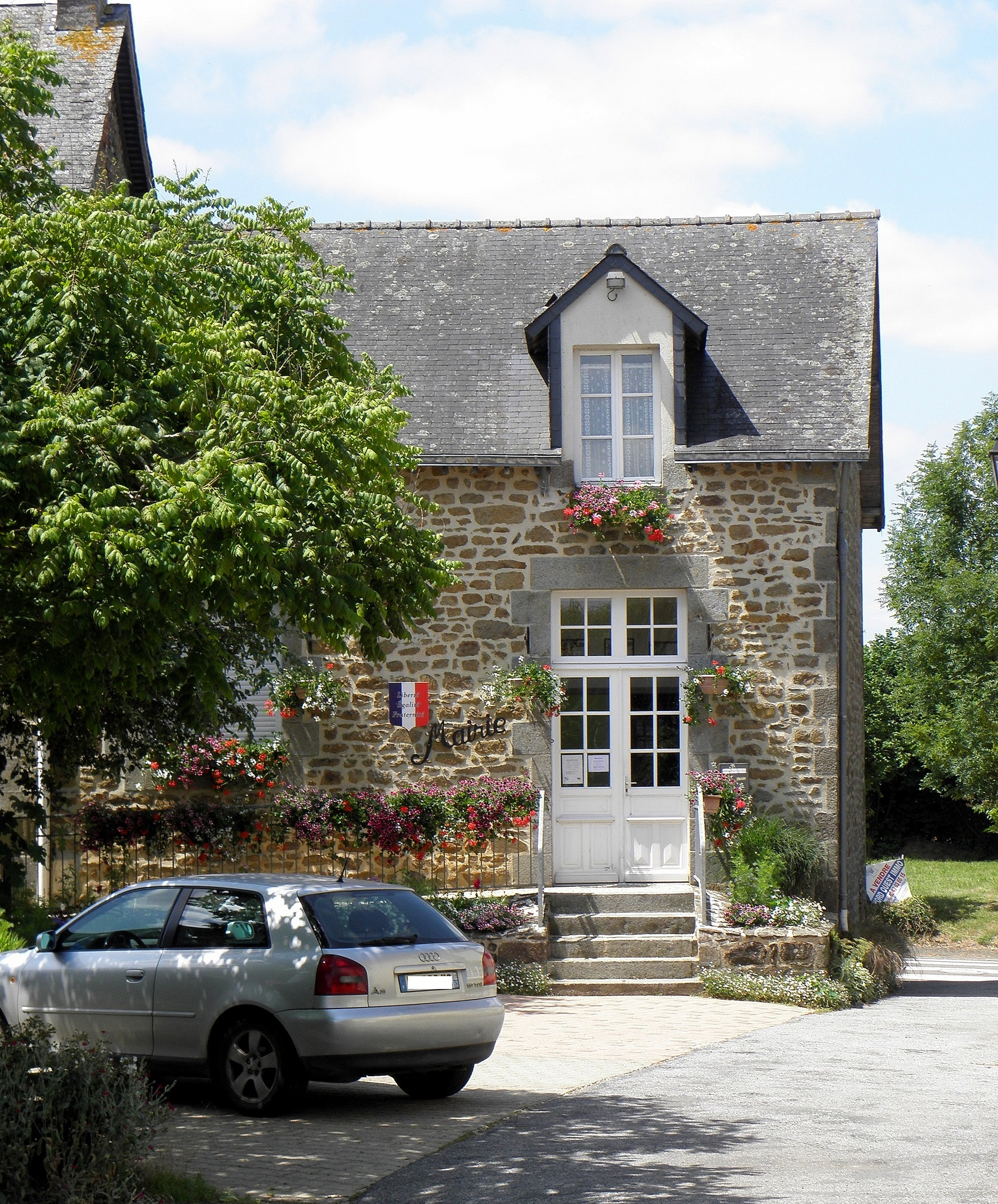 Mairie de Saint-Loup-du-Gast (53).